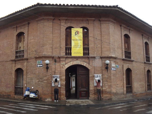 fachada